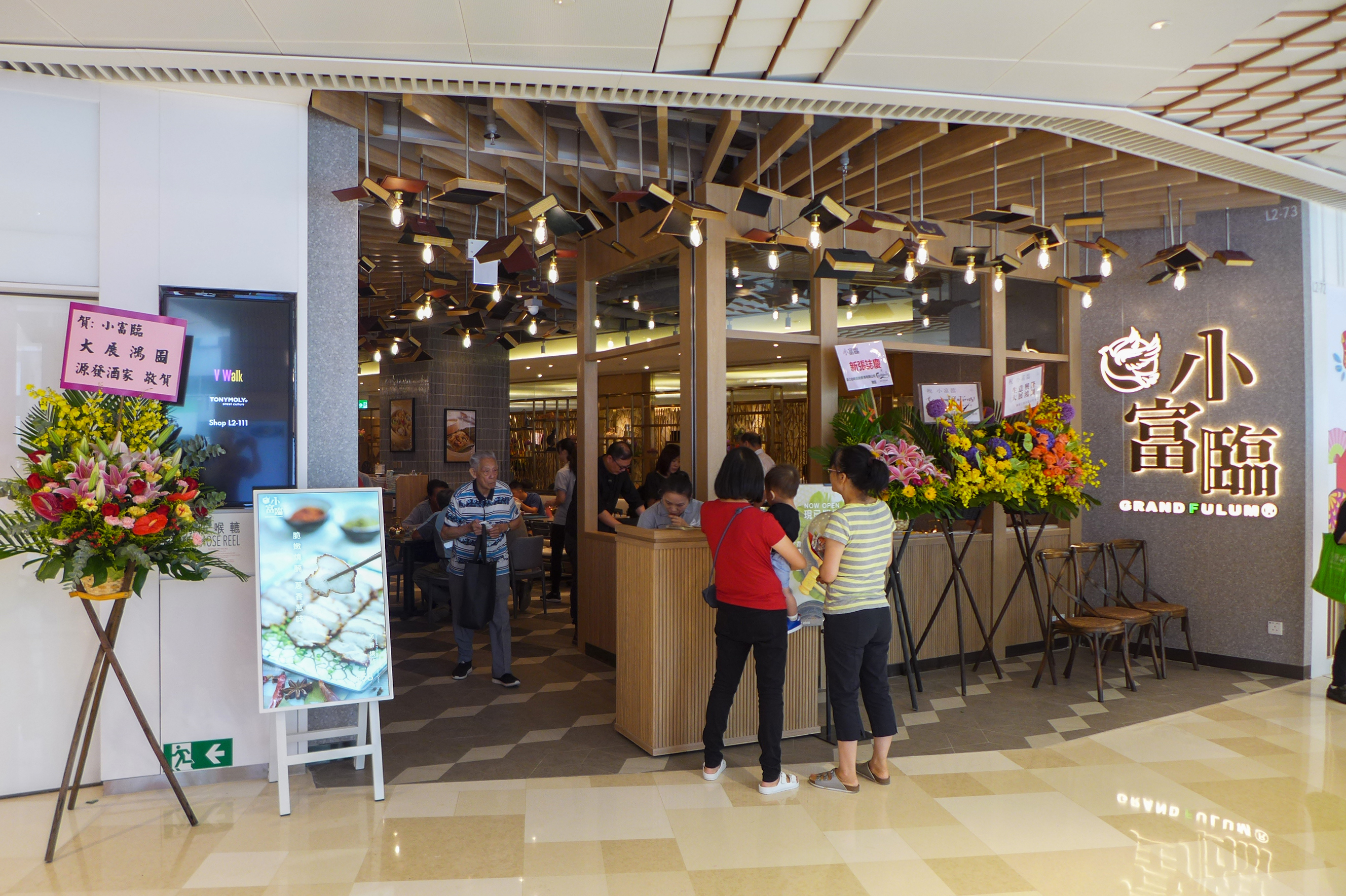 Grand Fulum in Vwalk